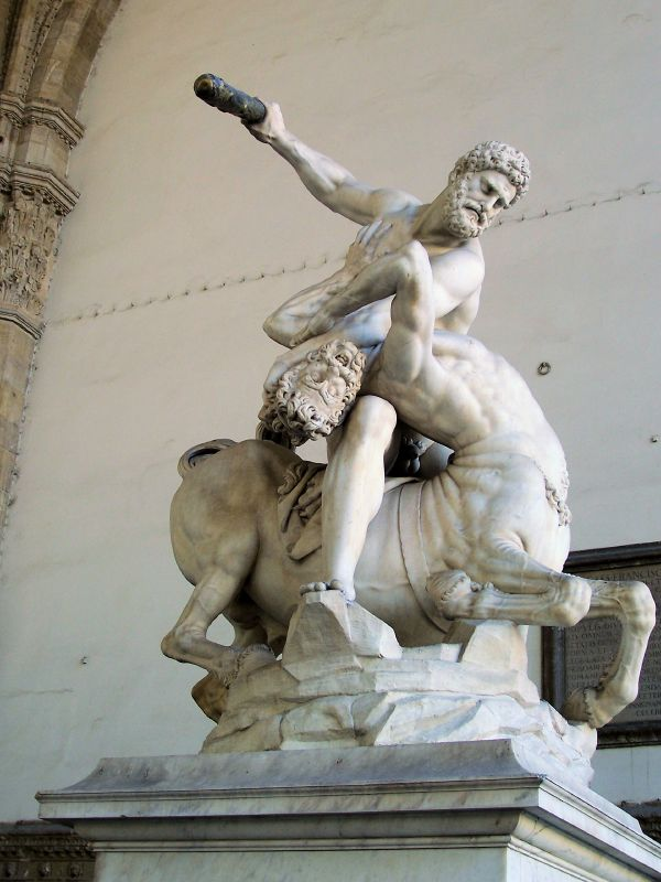 Héraclès et Nessos, Piazza Della Signoria, Firenze, Italia